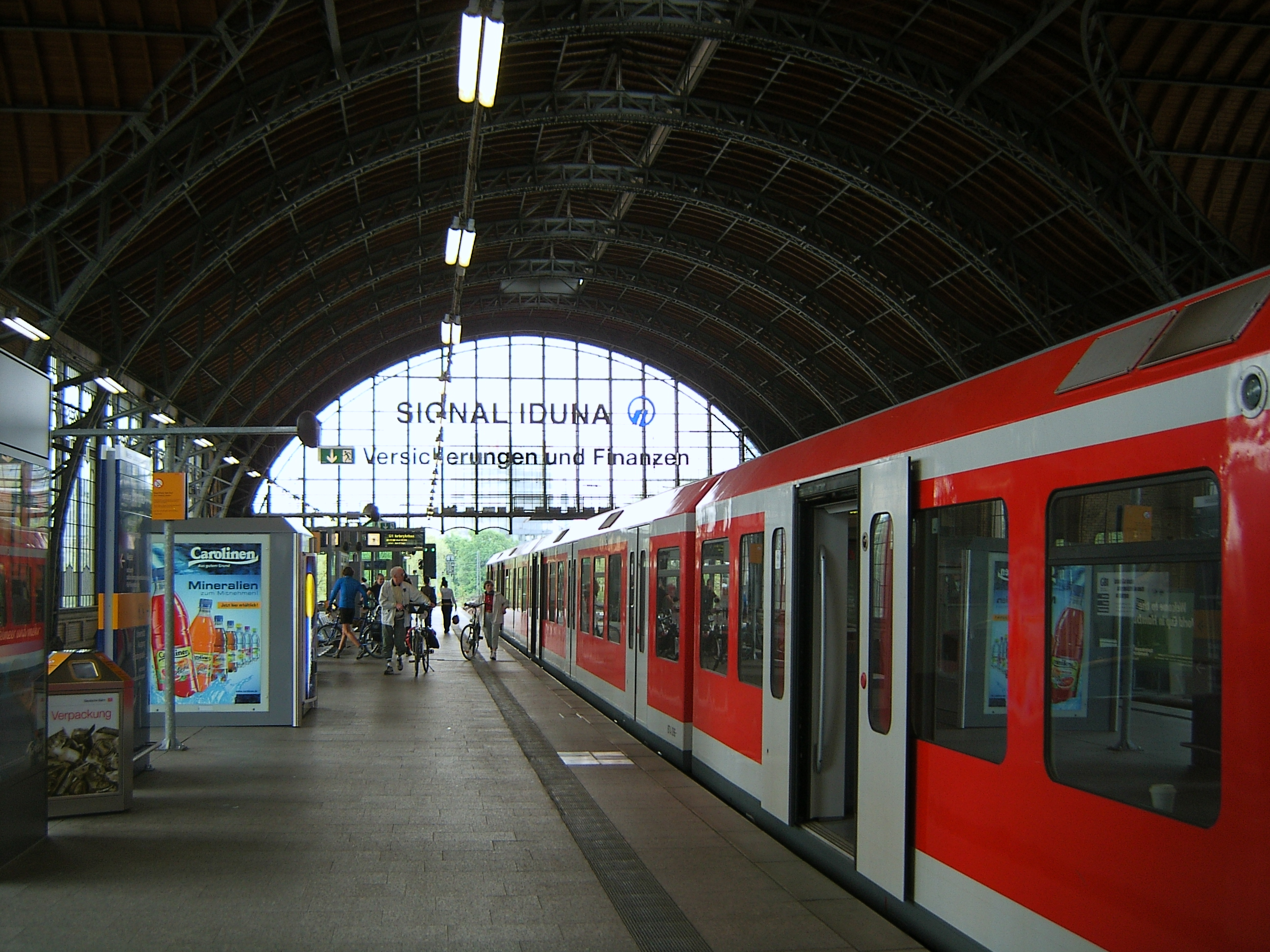 Bahnsteig der S-Bahn im Bahnhof Dammtor in Rotherbaum.